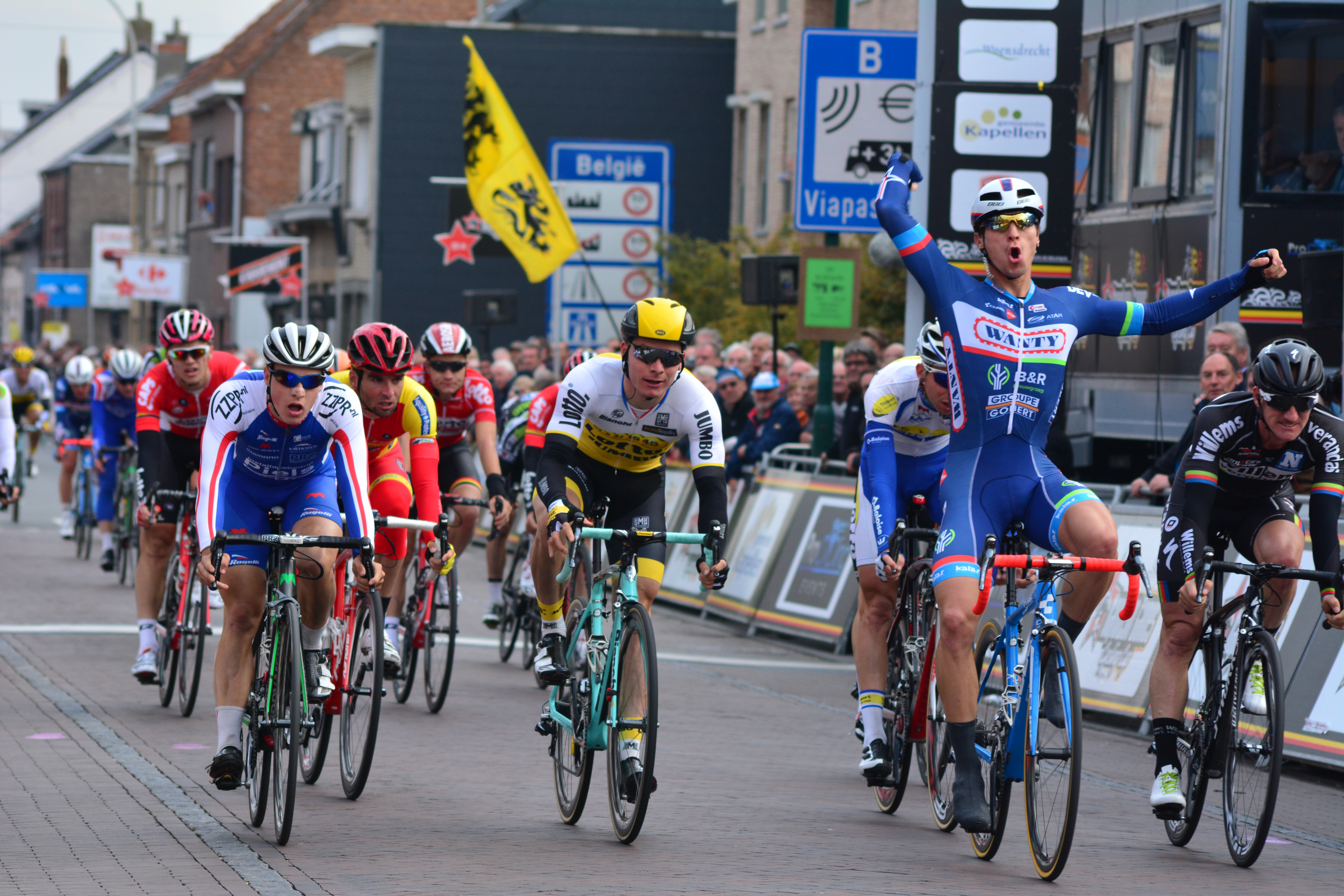 Roy Jans wint de Nationale Sluitingsprijs Putte-Kapellen editie 2016